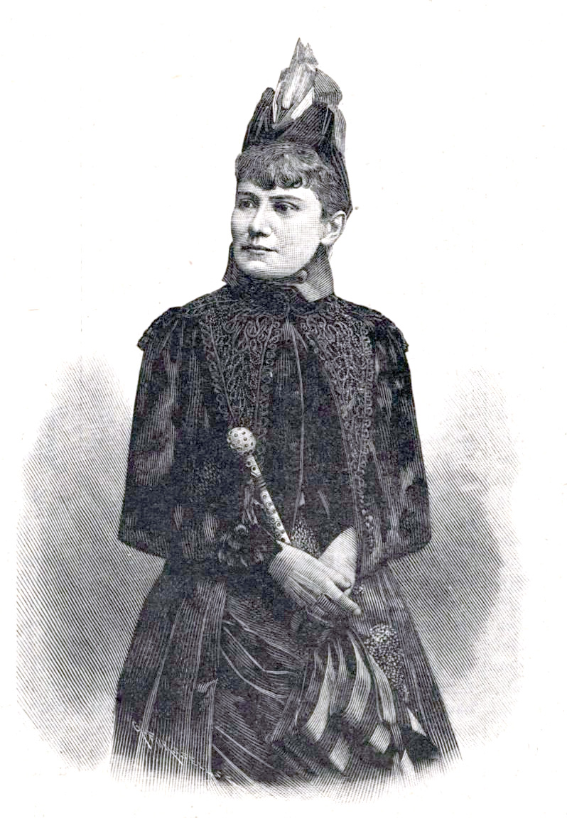 Tecla Åhlander (1855-1925)